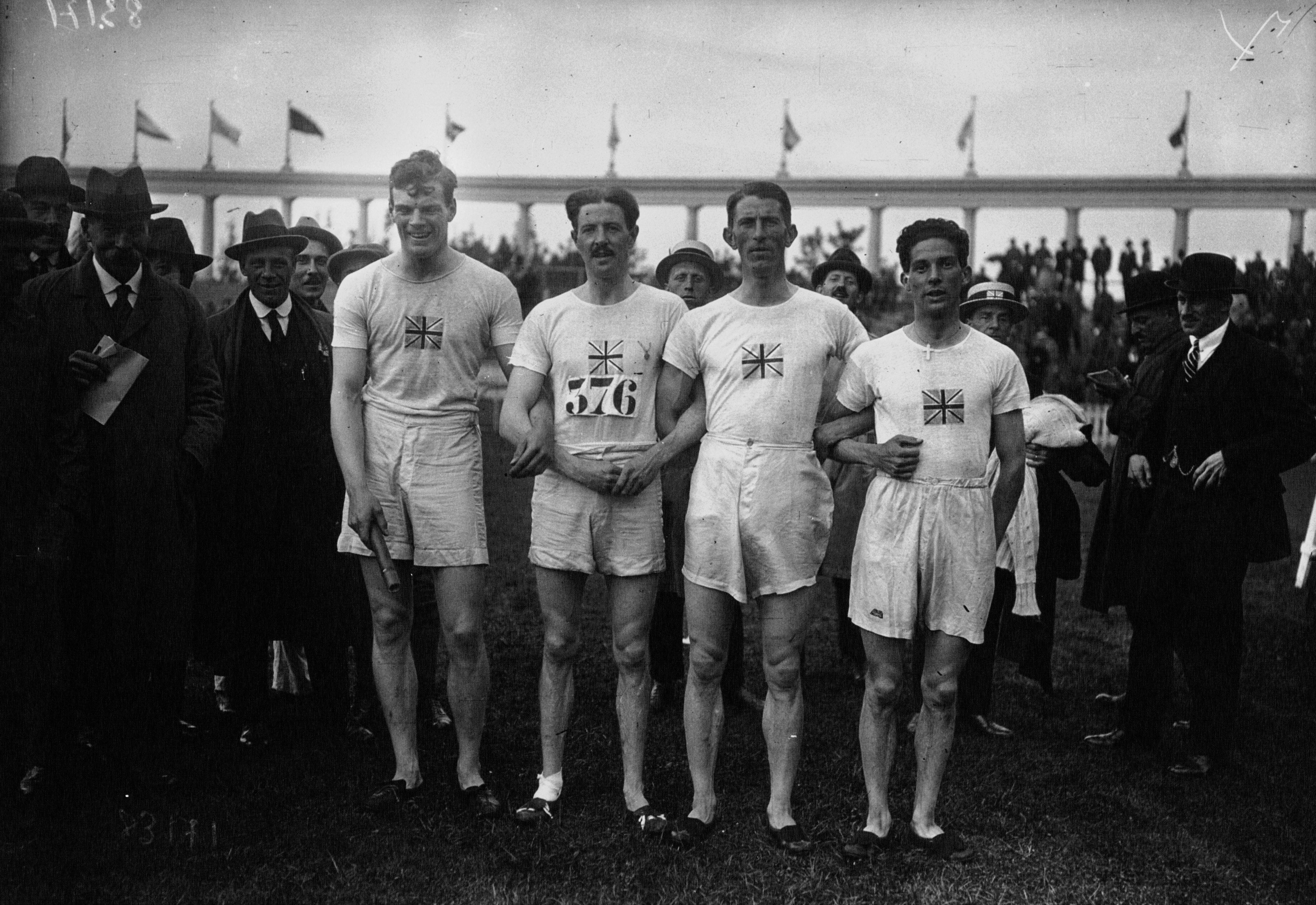 VIIes Olympiades à Anvers : équipe gagnante du 1600 m relais, Angleterre : [photographie de presse] / Agence Meurisse